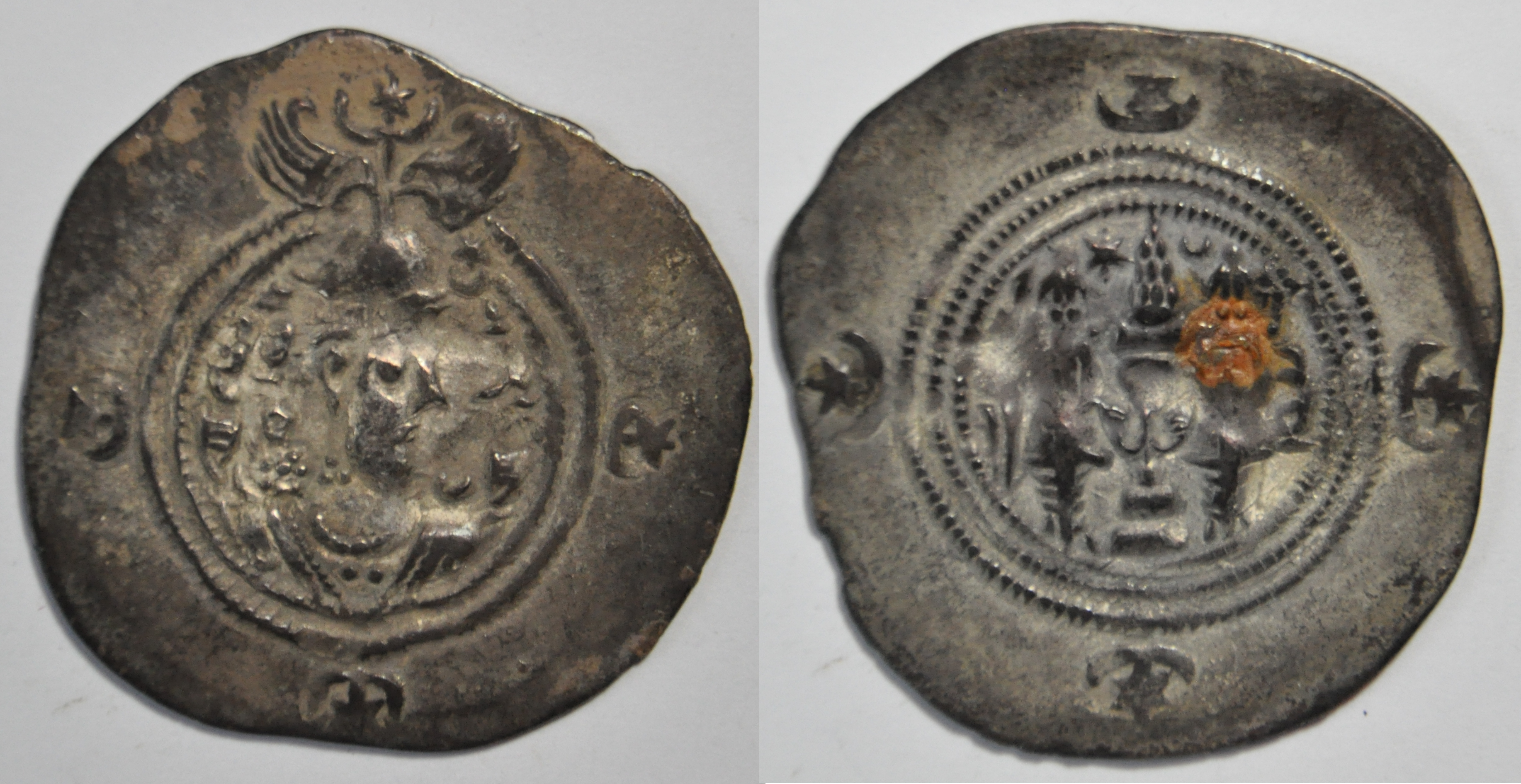 Une monnaie d'une drachme en argent de Khosro II (590-628) de la dynastie sassanide (226-650) à Adurbadagan, Azerbaïdjan. Dimension : 31 mm Poids : 4.1 g. Référence : Göbl II/2